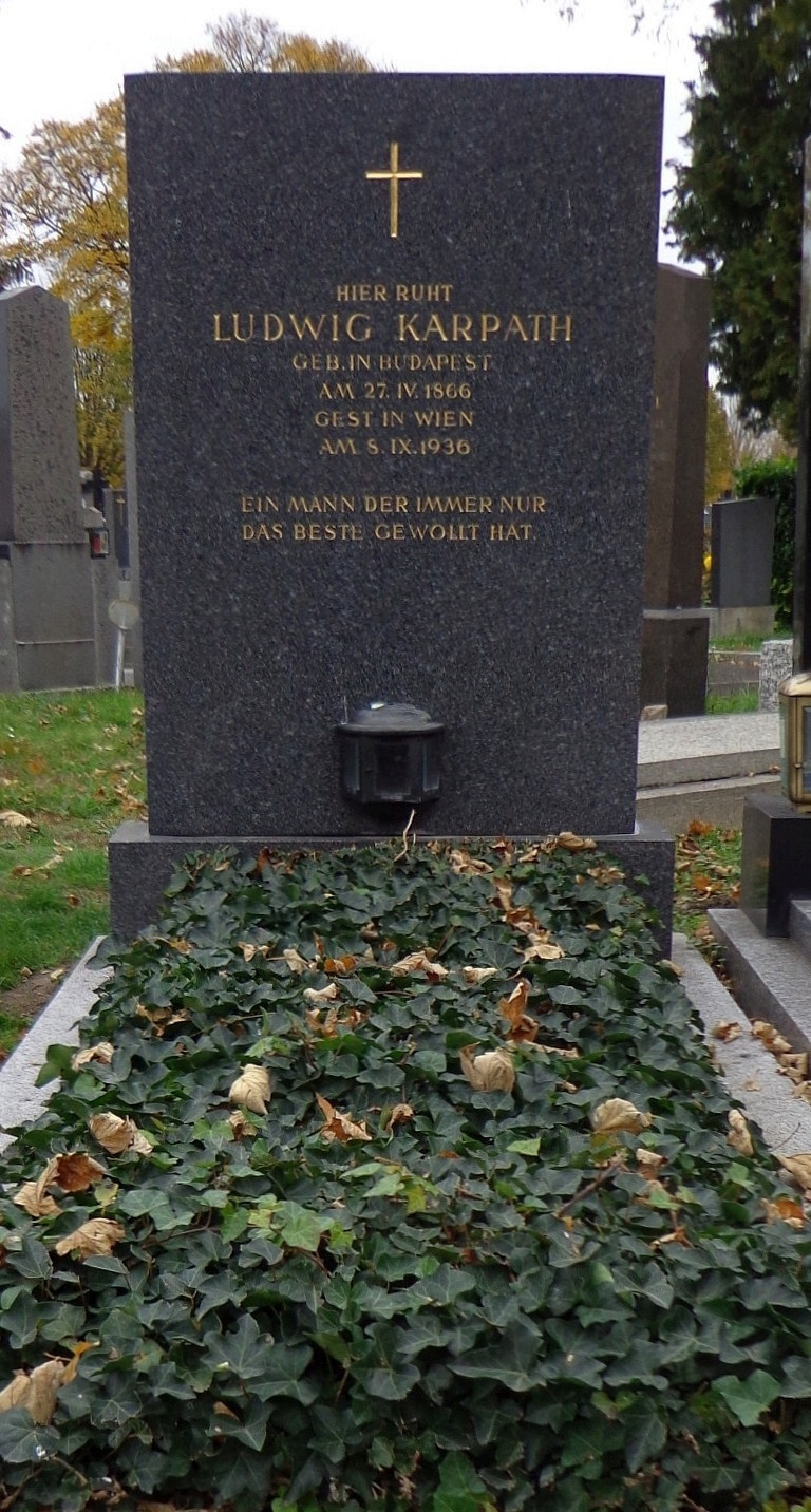 Wiener Zentralfriedhof - Gruppe 30D: Ehrengrab von Ludwig Karpath